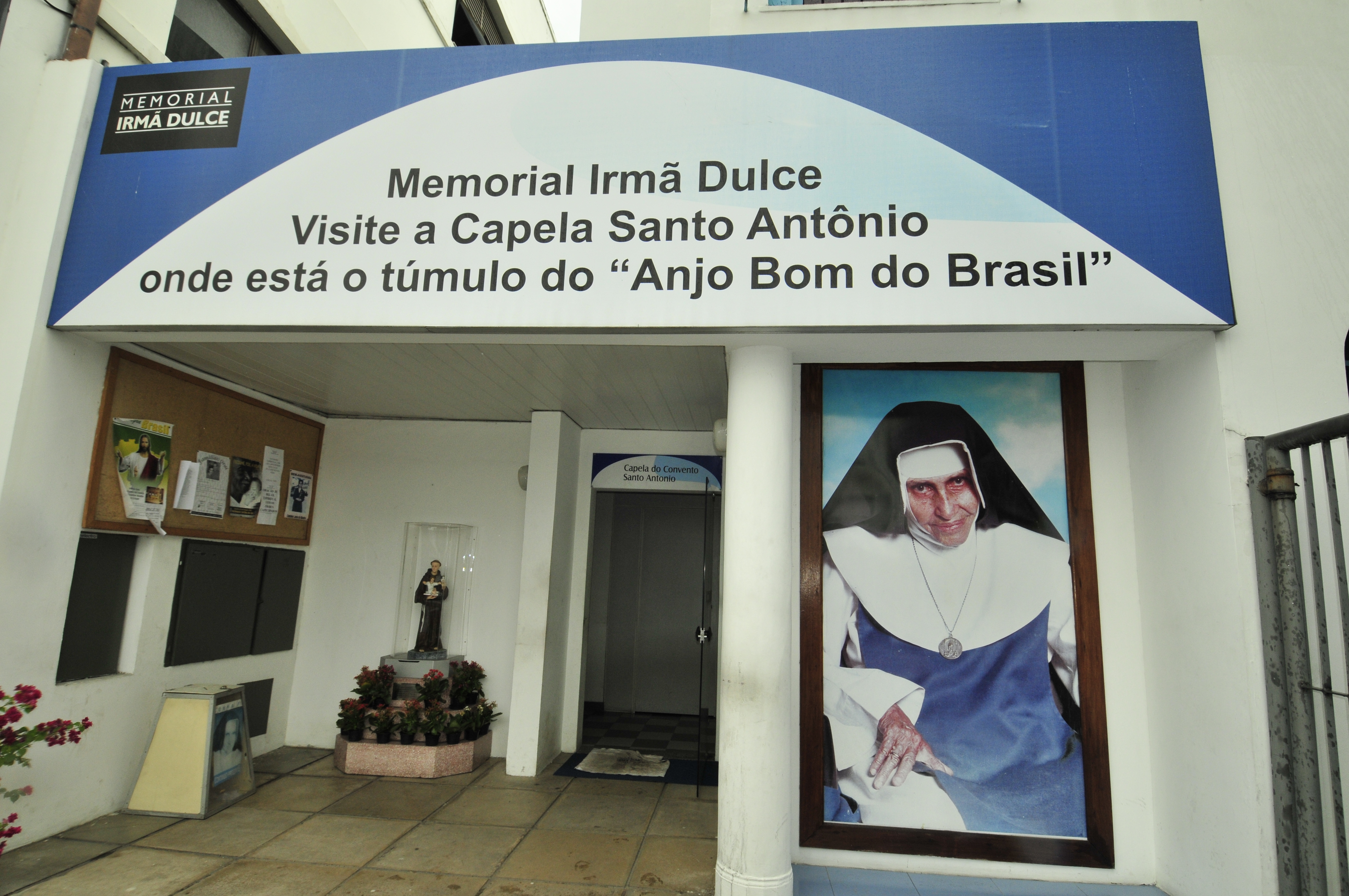 Memorial de Irmã Dulce, na Cidade Baixa, retrata a trajetória da freira baiana. Foto: Jota Freitas - Setur- Bahiatursa.